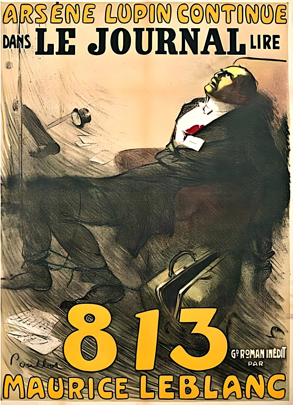 Affiche publicitaire de Poulbot pour l'ouvrage de Maurice Leblanc, 813.